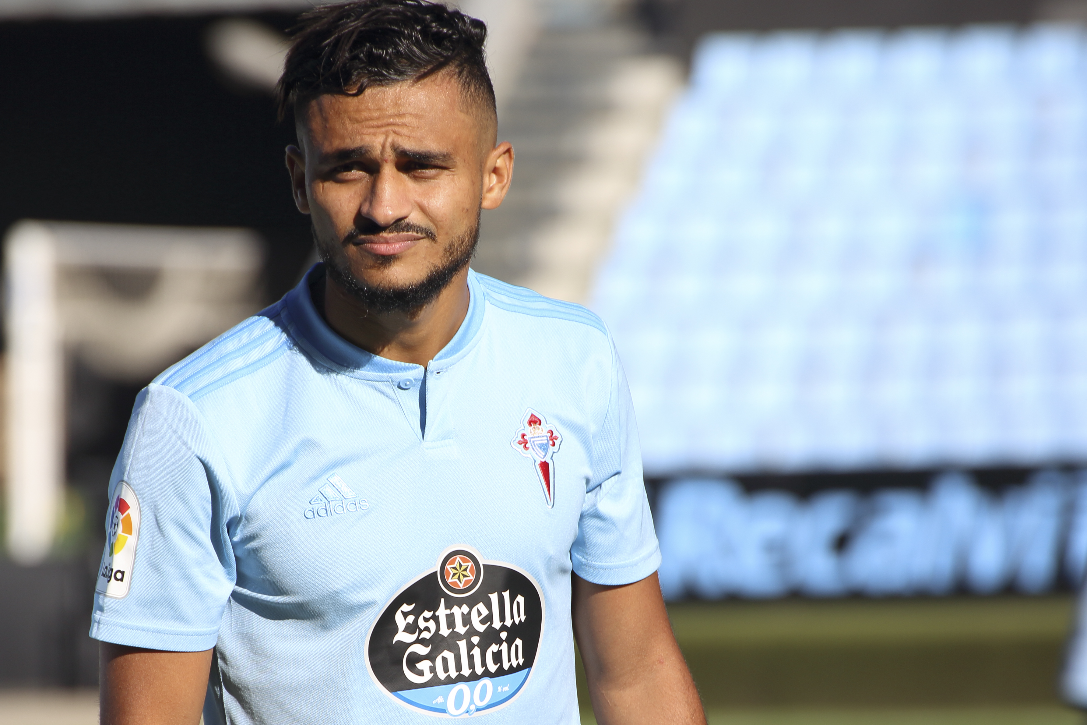 Presentación RC Celta - Temporada 18/19